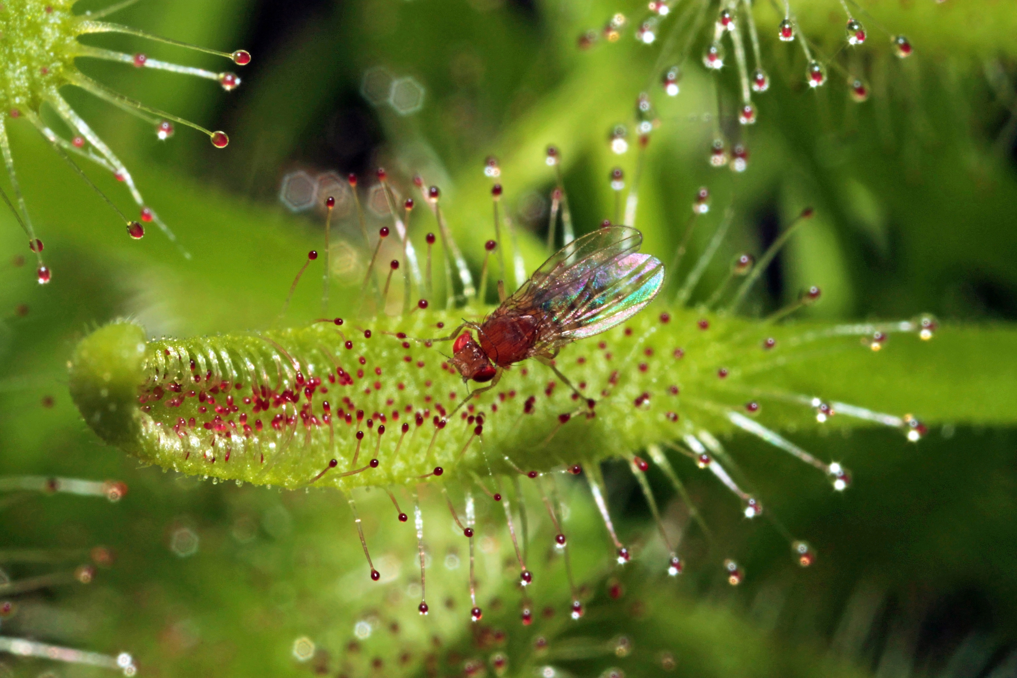 Drosophila melanogaster ♀, Drosera capensis